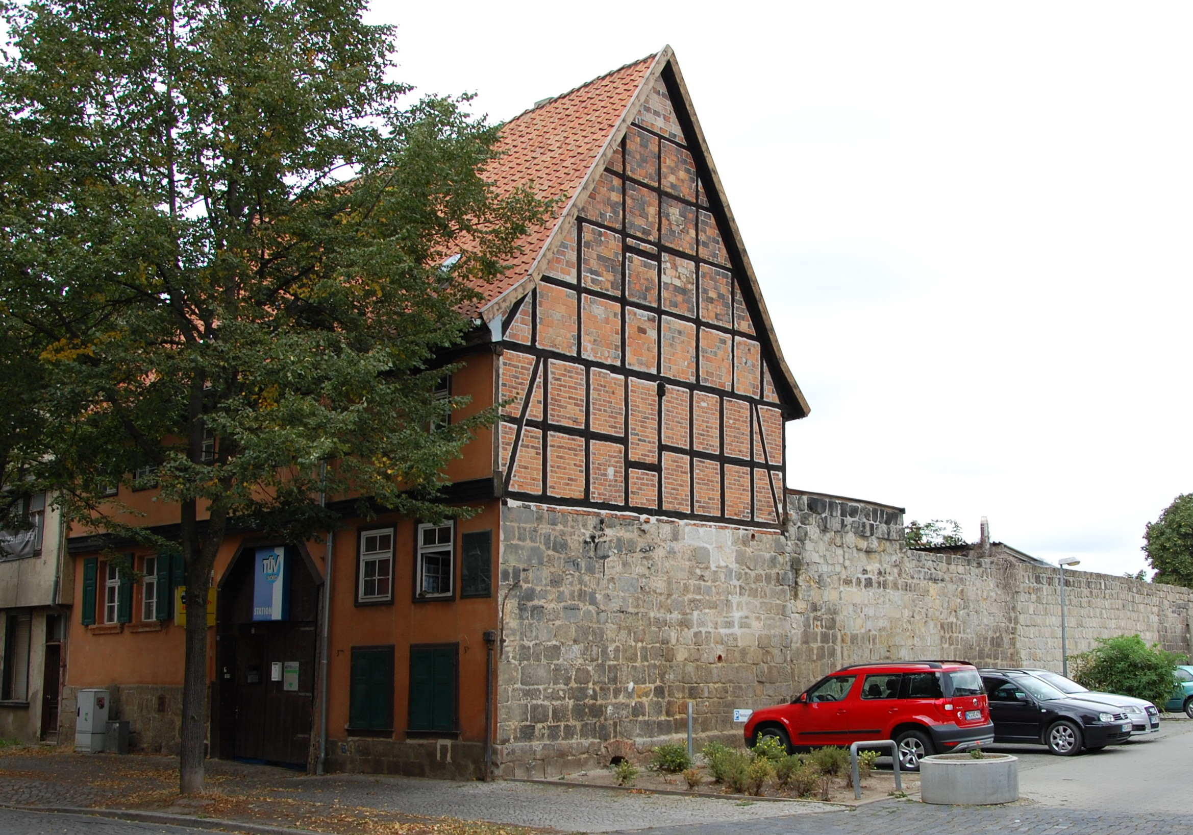 Haus Steineg 43 in Quedlinburg